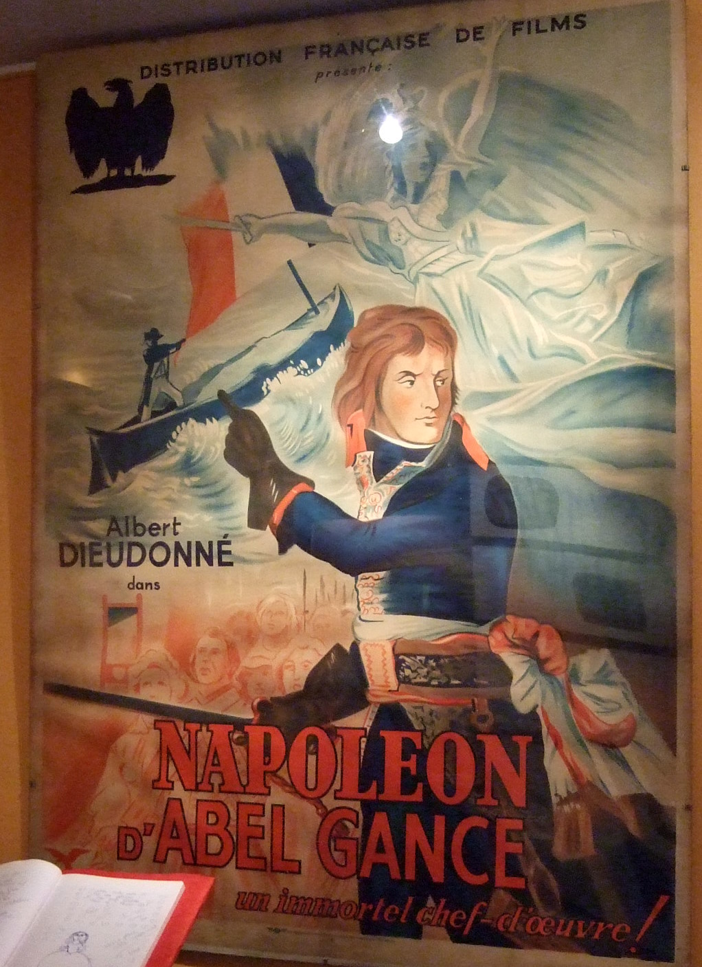 projection du "Napoléon" d'Abel Gance